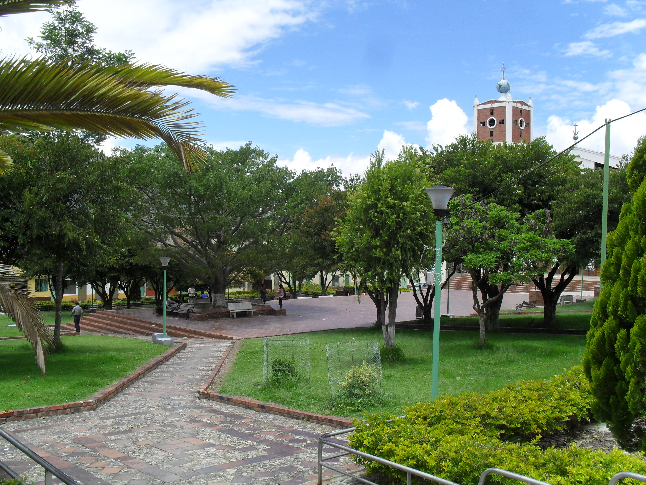 Parque Principal del municipio de El Espino, departamento de Boyacá, Colombia